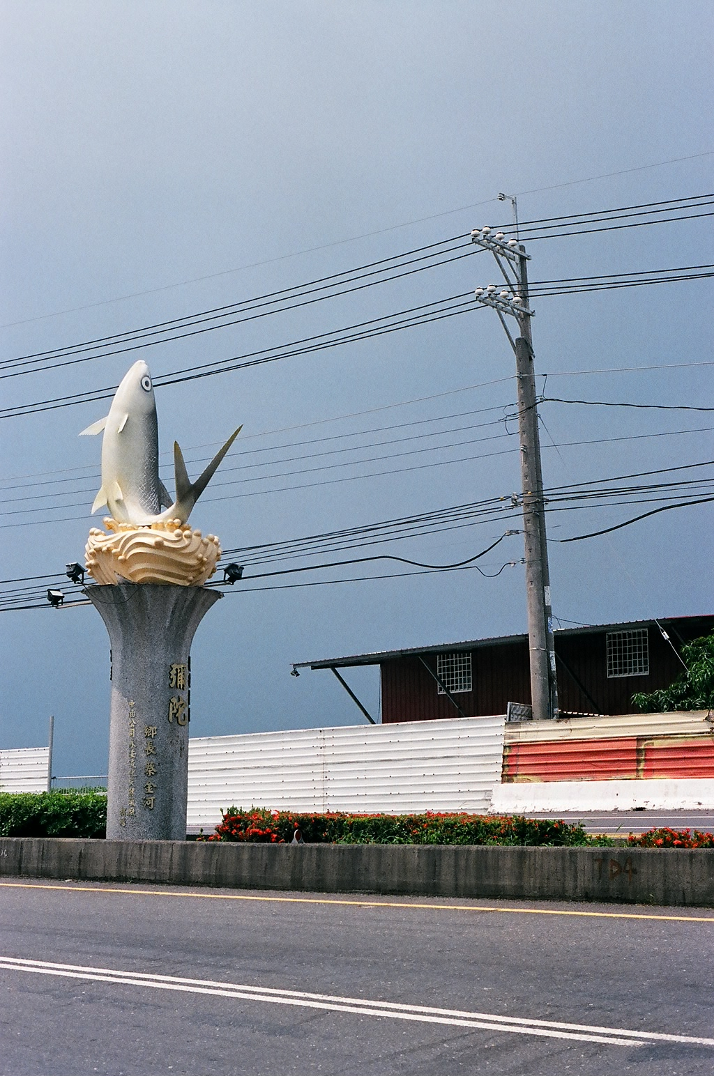 彌陀的魚